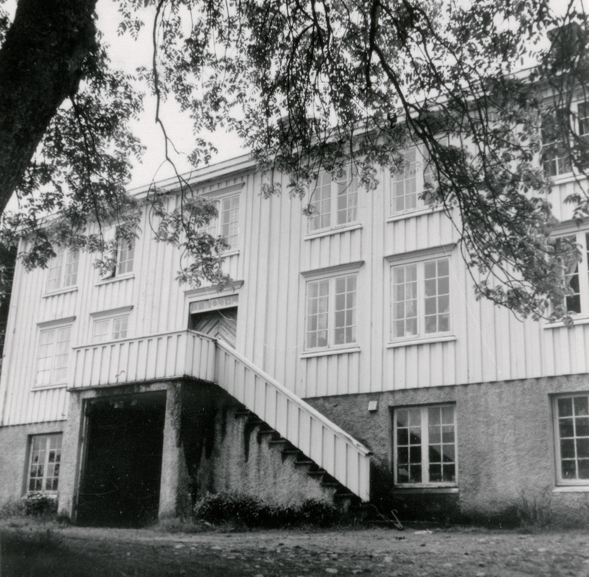 Frei prestegård, Kristiansund kommune